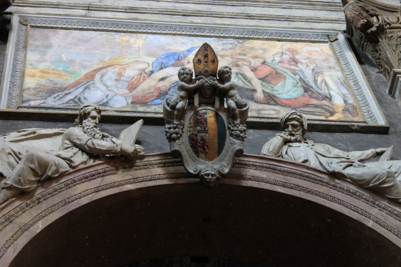 Chiesa di San Gaetano a Padova